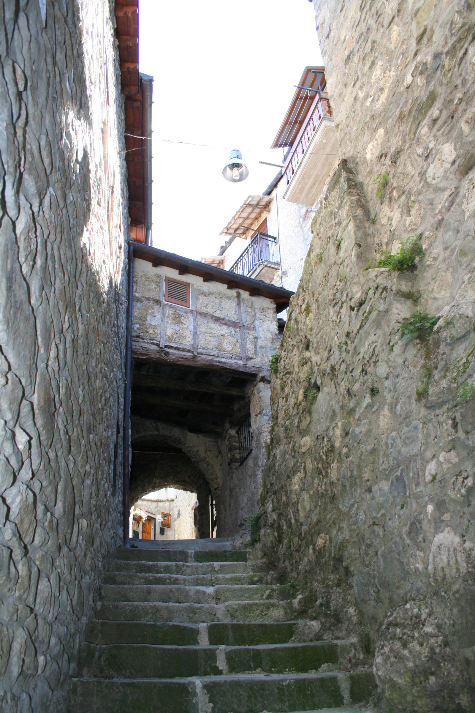 Interno del paese di Pietracamela in provincia di Teramo - Strada a gradinata.